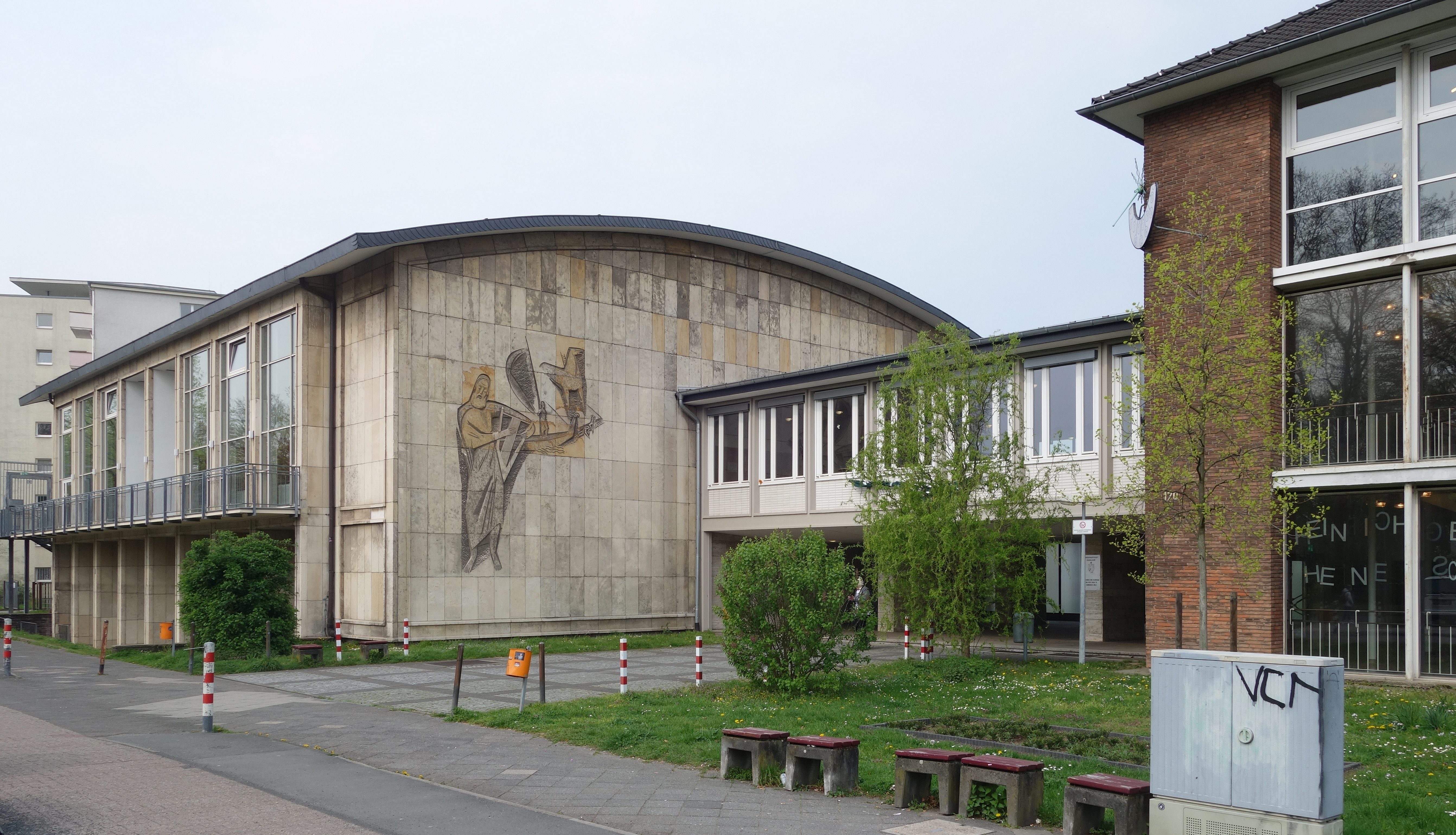 Heinrich-Heine-Gesamtschule, Düsseldorf, 2019.